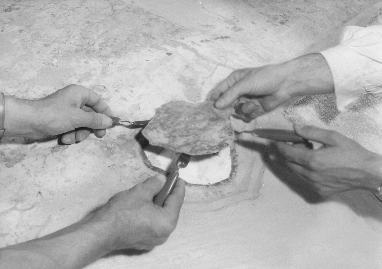 Prace konserwatorskie przy malowidłach z Faras w Muzeum Narodowym w Warszawie. Prace przy niszy z przedstawieniem Matki Boskiej z Dzieciątkiem, wycinanie anagramów od strony odwrocia.